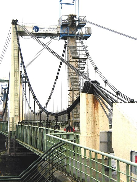 Suspension dans la travée de rive côté Montjean-sur-Loire